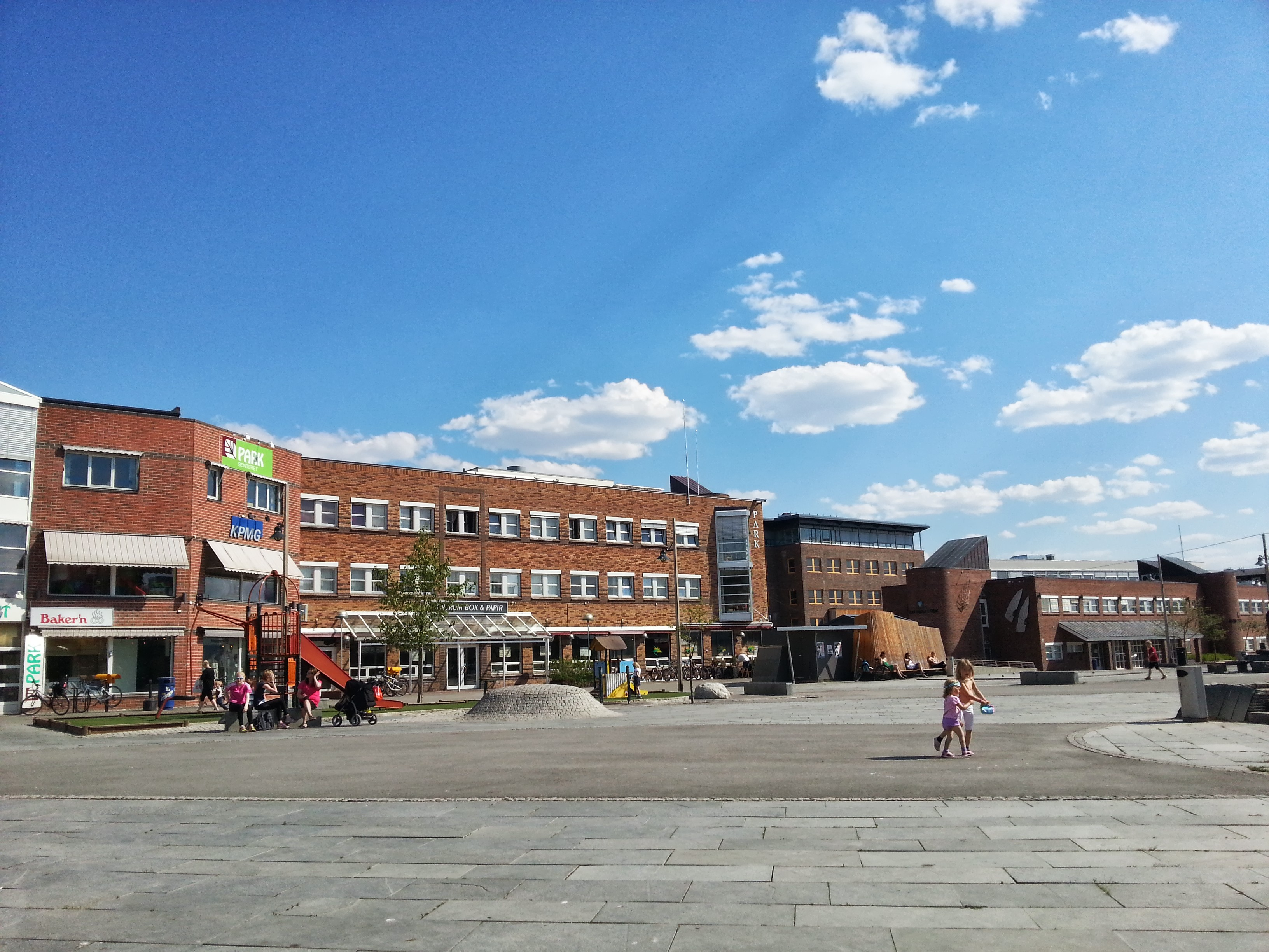 Bilde av Alta sentrum sommeren 2013.